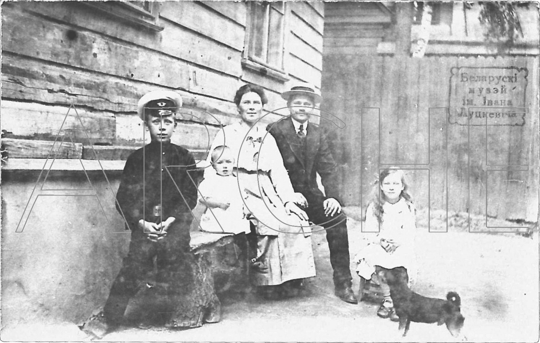 Гальяш Леўчык (сапр. прозвішча — Ілля Ляўковіч; 1880–1944), беларускі літаратар і публіцыст з-пад Слоніма разам са сваёй раднёй. Фота 1910-х гг. З фондаў БДАМЛМ